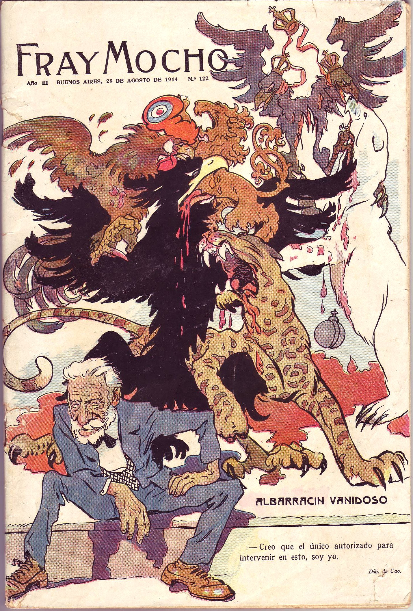 Albarracín vanidoso: -Creo que el único autorizado para intervenír en esto, soy yo.